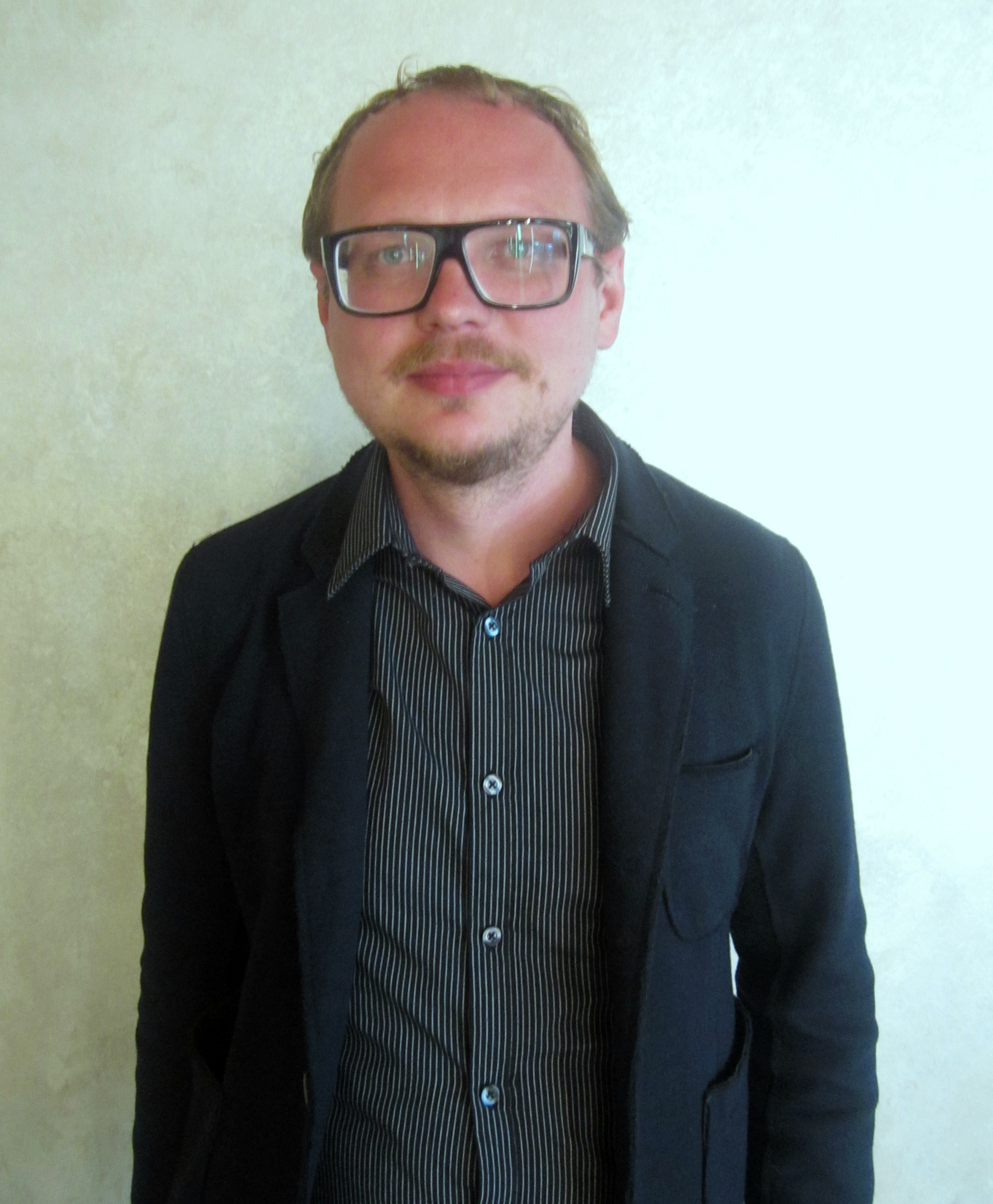 Андрей Курейчик — киносценарист, драматург, режиссёр, публицист.